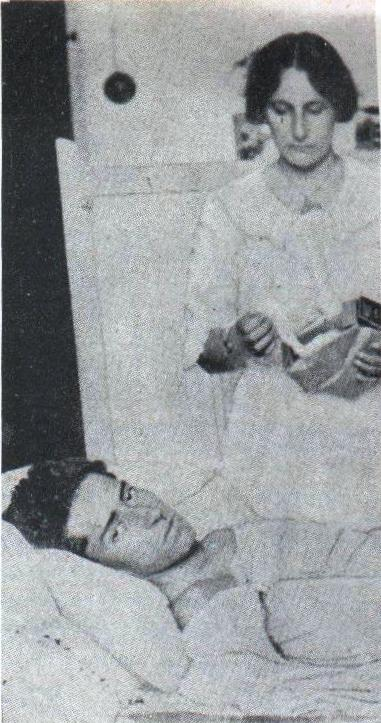 El teniente José Azueta Abad rechaza la atención de los médicos estadounidenses.